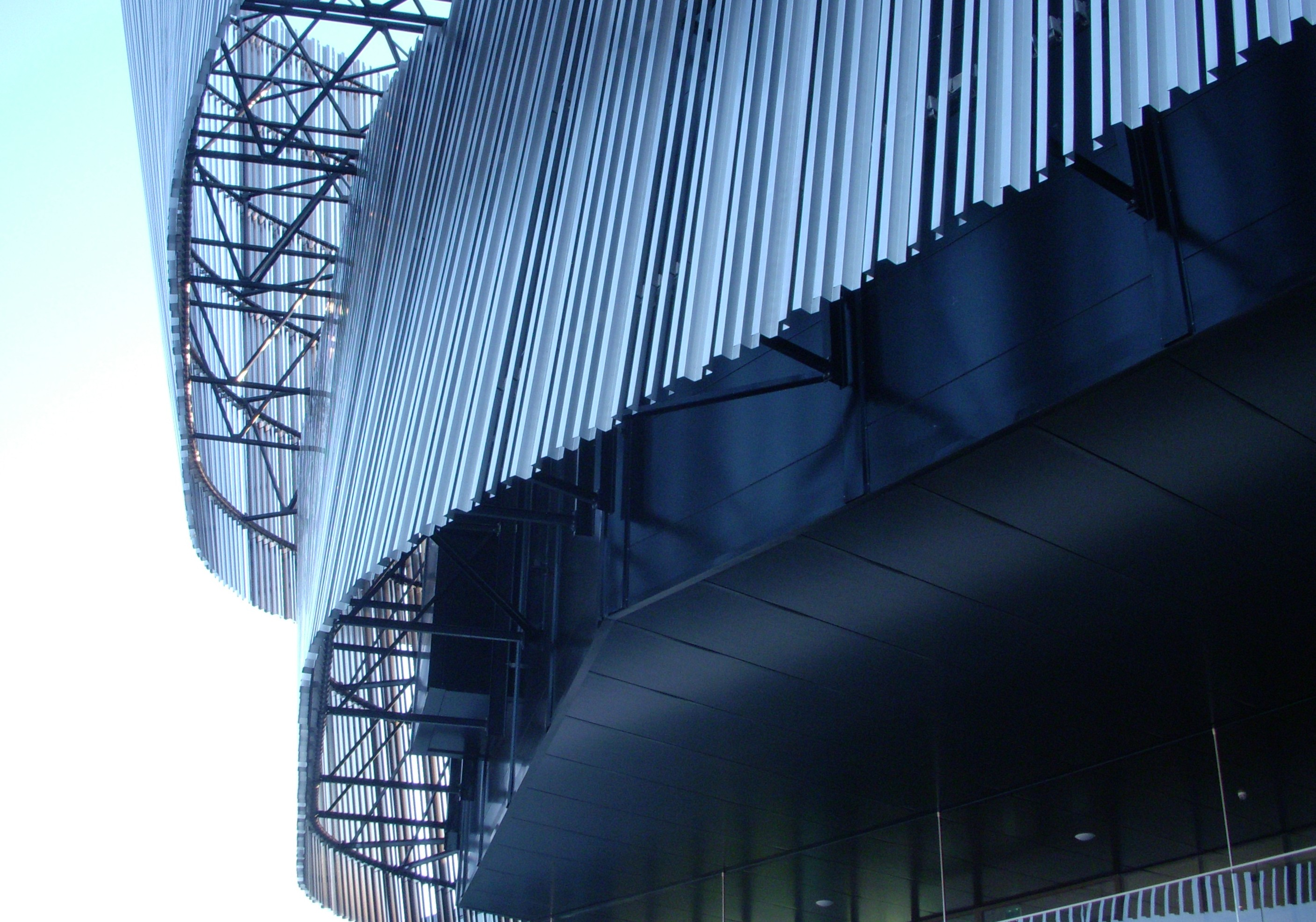 Stockholm Waterfront, kongressdel, fasaddetalj